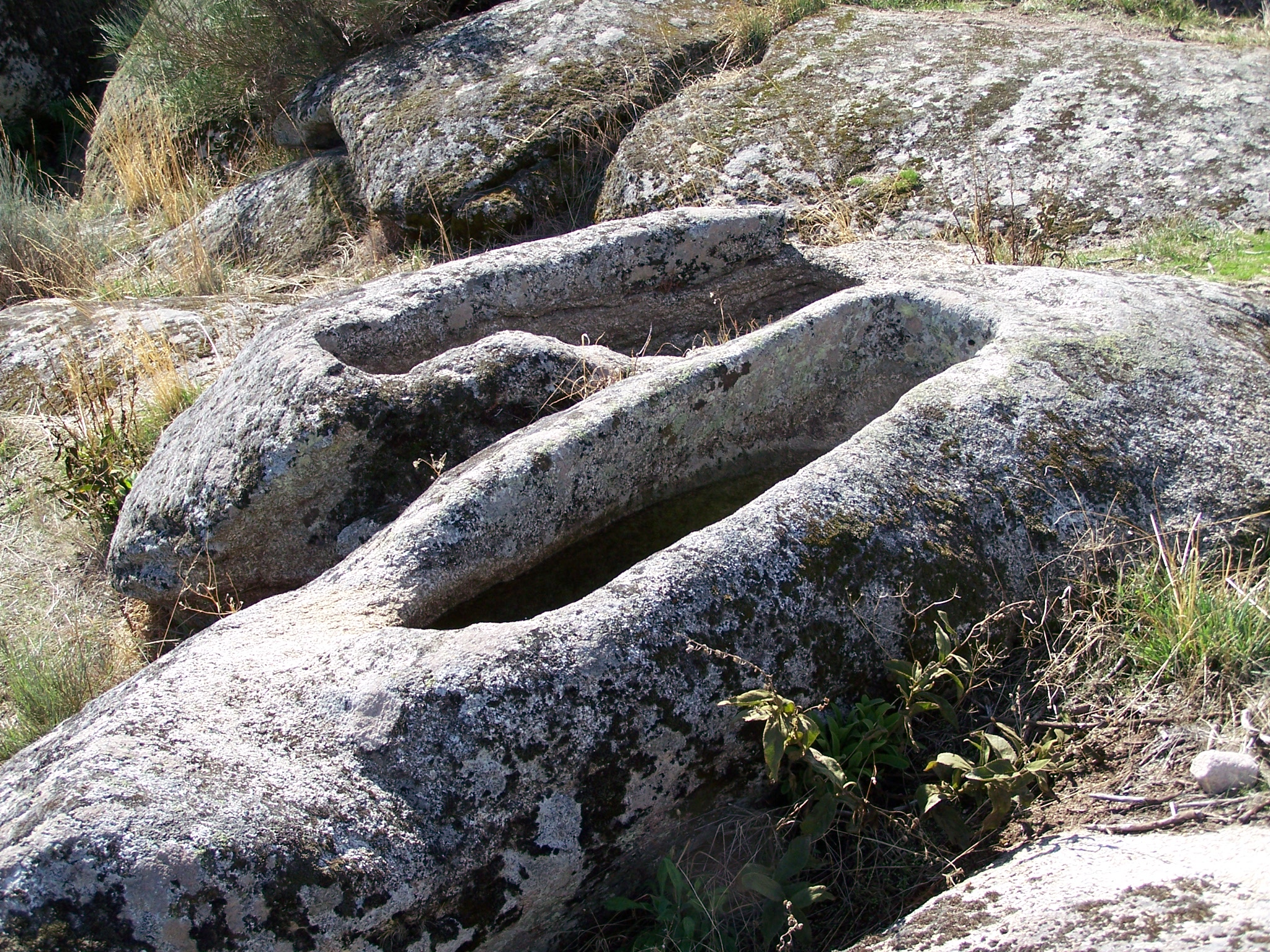 Necrópole de S. Gens, perto de Celorico da Beira, Portugal.